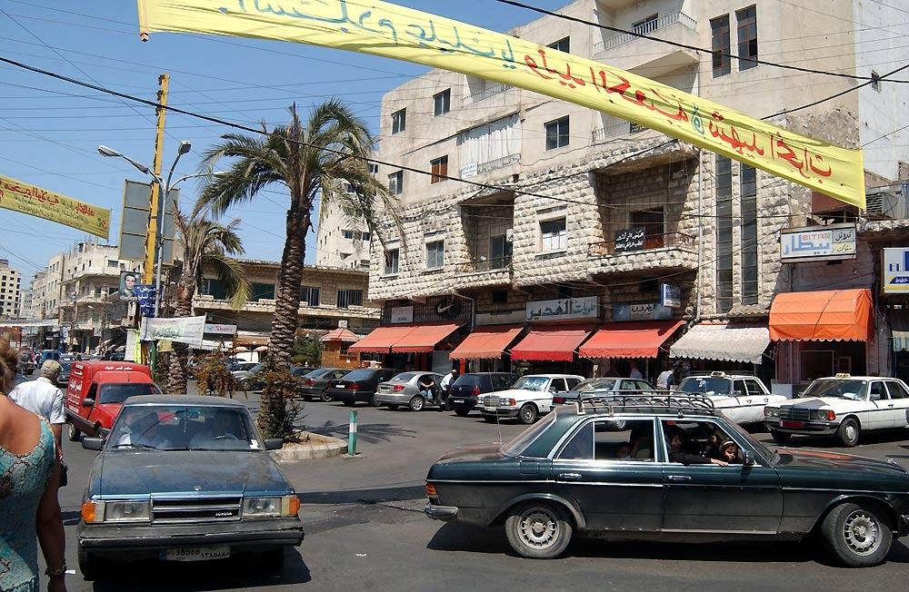 Le centre de Nabatieh avant les bombardements de 2006